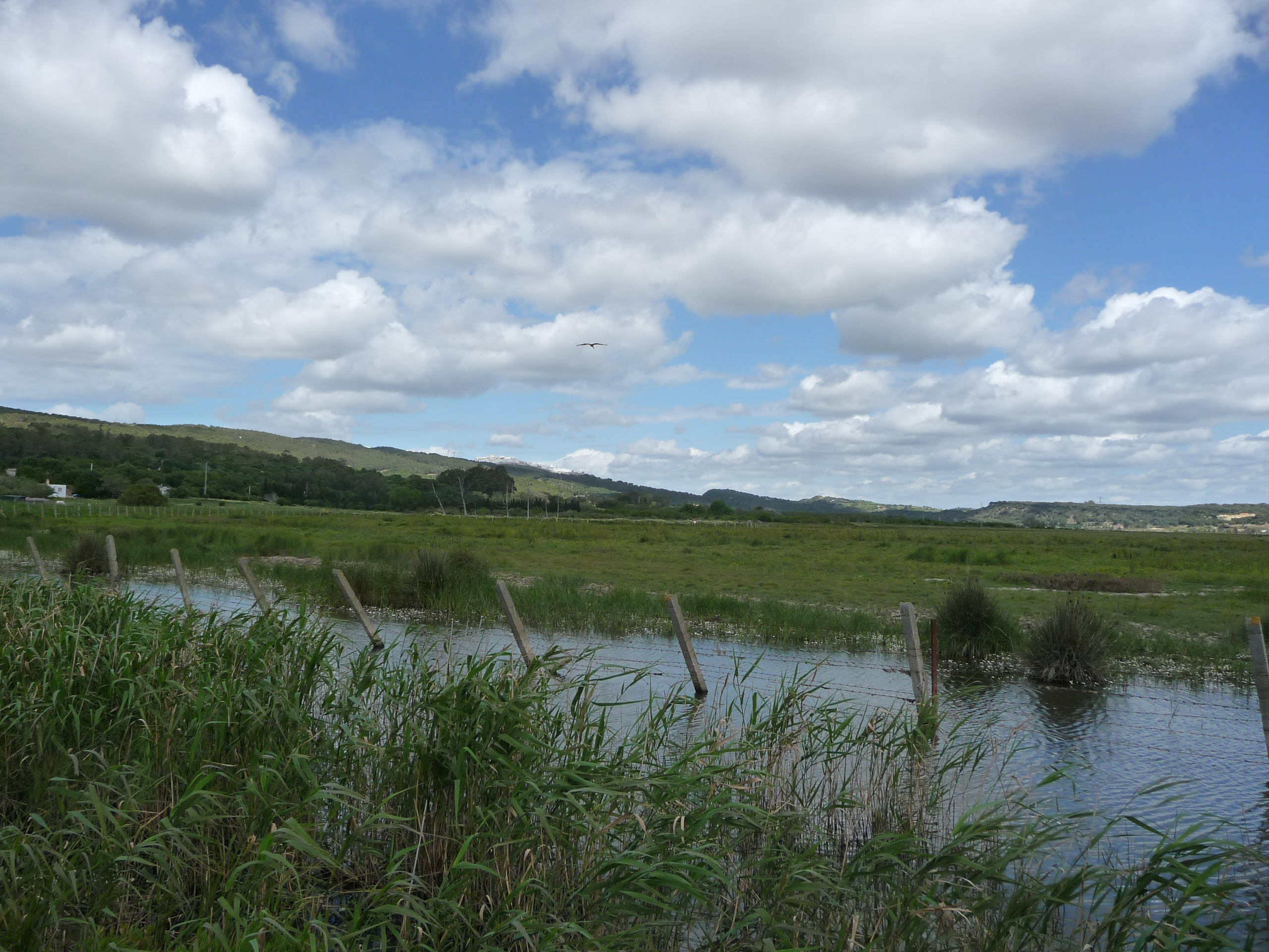 PNMarismasBarbate-p1020262.jpg